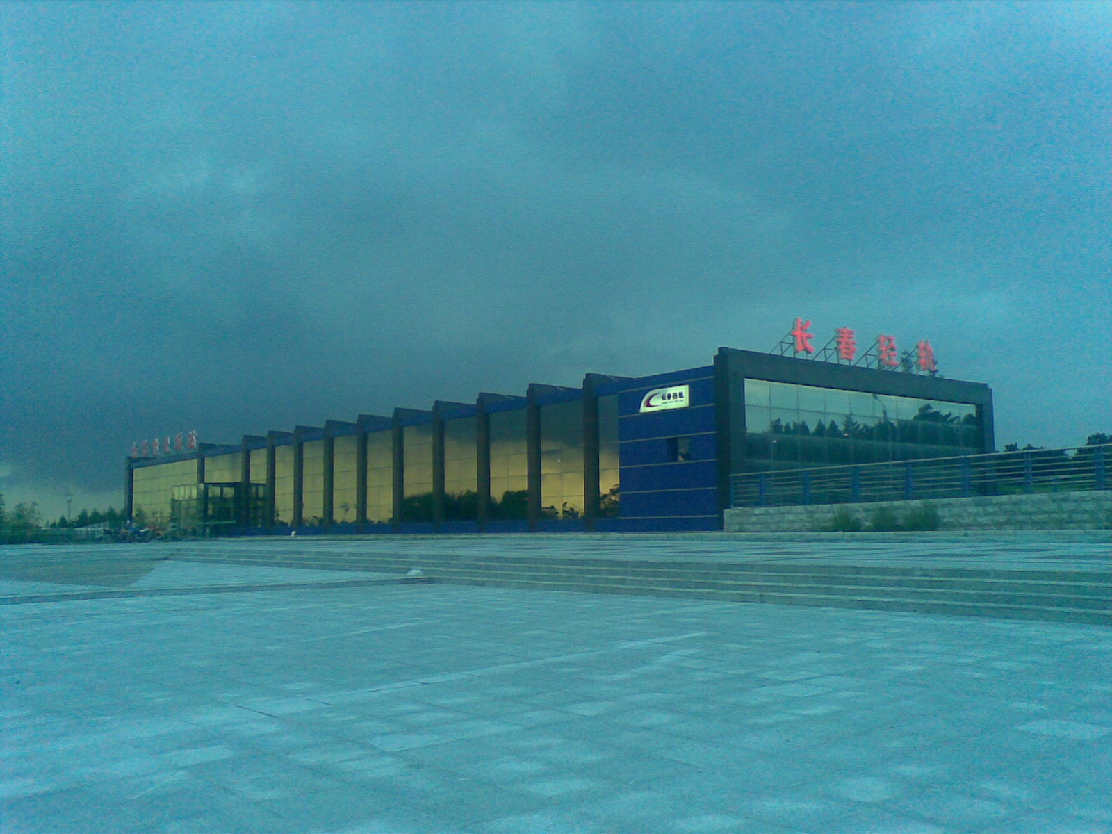 长影世纪城轻轨站